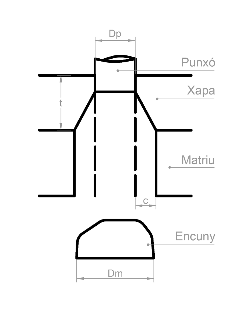 Esquema Troquelado